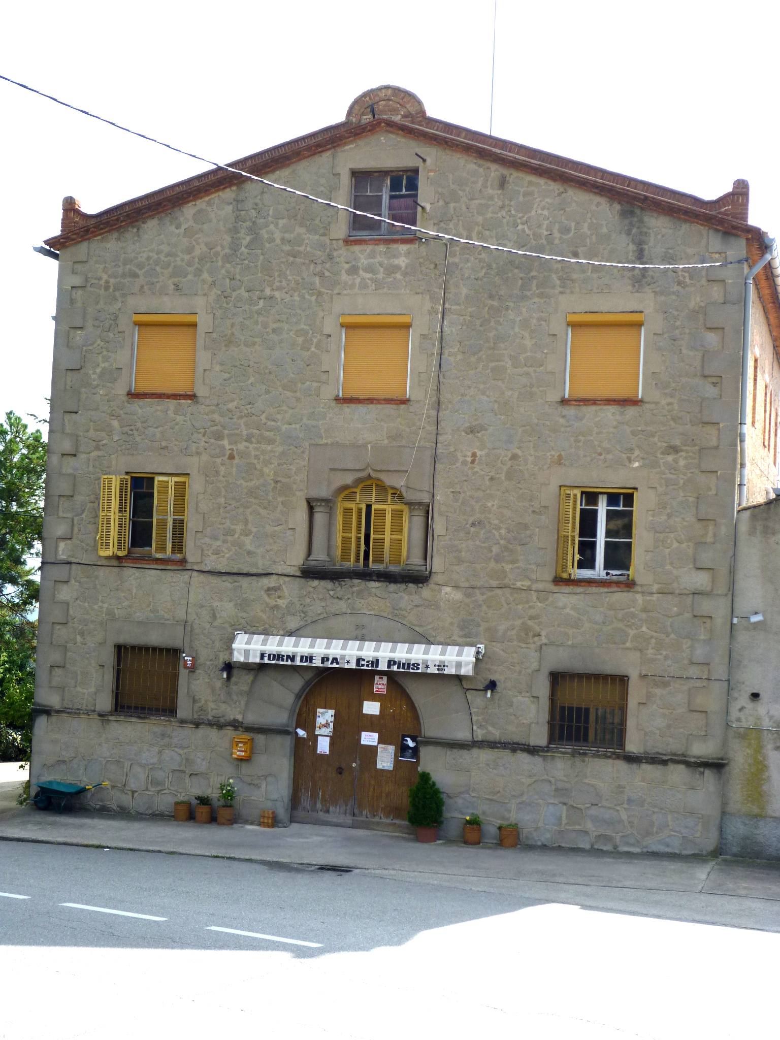 Cal Pius (l'Espunyola): façana nord